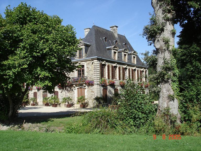 Manoir de Tronjoly, Gourin (Morbihan) Photo G. Bourrel